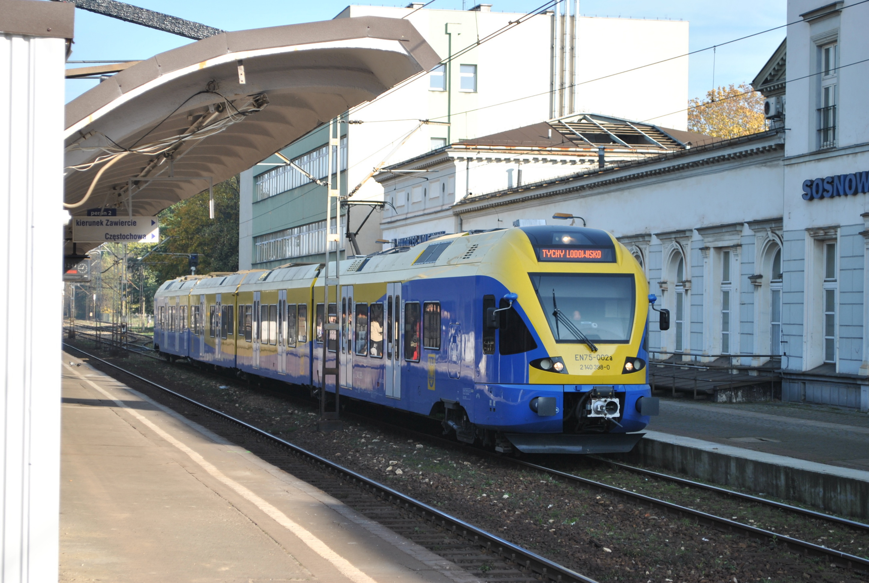 EN75 na stacji Sosnowiec Główny (peron 1.)